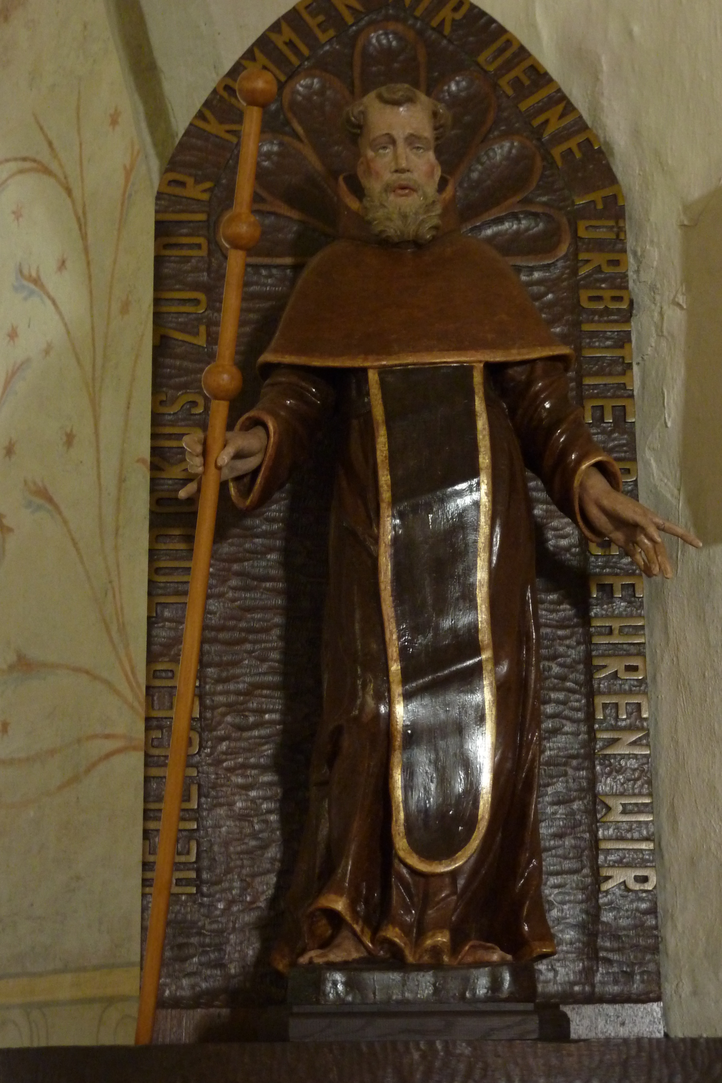 Wallfahrtskapelle St. Jost in Langenfeld (Eifel), Skulptur des hl Jost